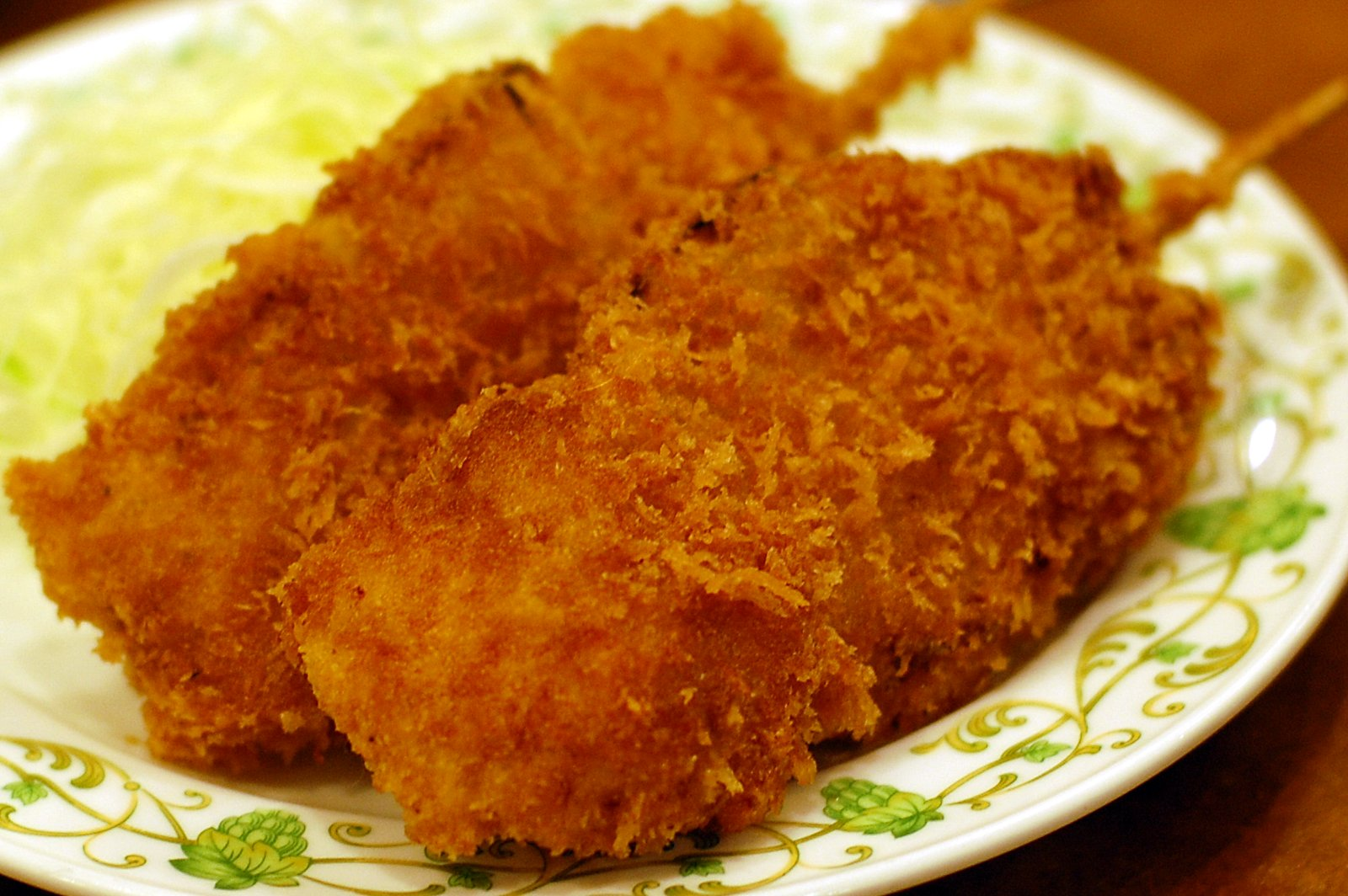 2本で400円ちょい。非常にお安くて美味しいので2人以上でいくならば是非つまみたい1品。